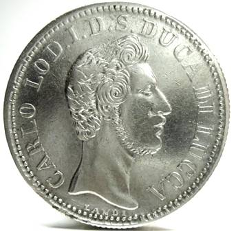 Moneda de 2 Liras del Duque Carlos II de Parma 1837. Con la leyenda: Carlos Luis Infante de España Duque de Lucca.Cabeza mirando a la derecha. Abajo, en el centro, LANDI, Carlo Landi, ensayador